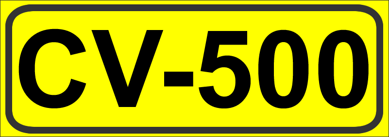 Inidcador de la Carretera de la Comunidad Valenciana CV-500